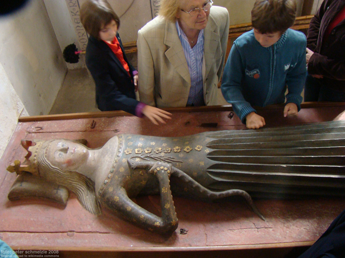 Besucher am Notburgagrab in der Notburgakirche in Haßmersheim-Hochhausen